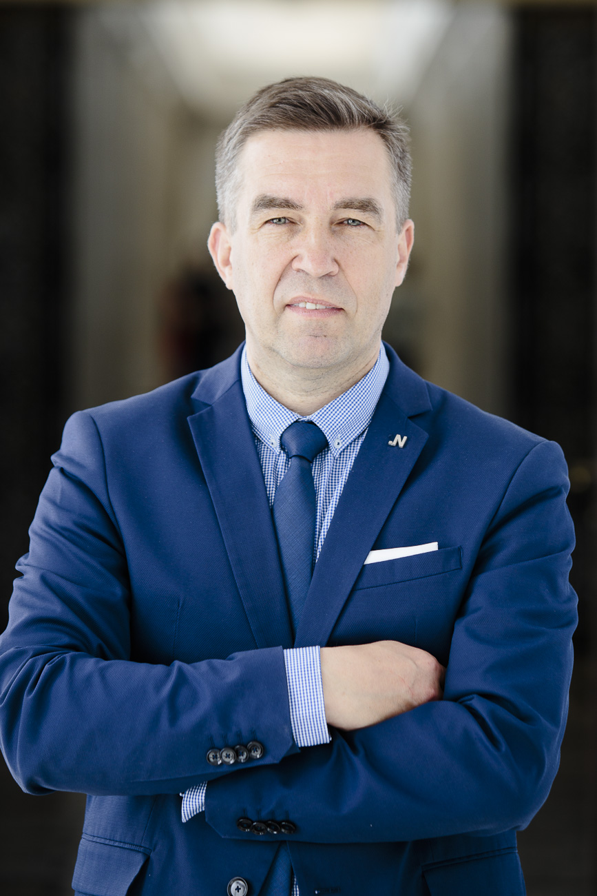 Poseł na Sejm RP Zbigniew Gryglas